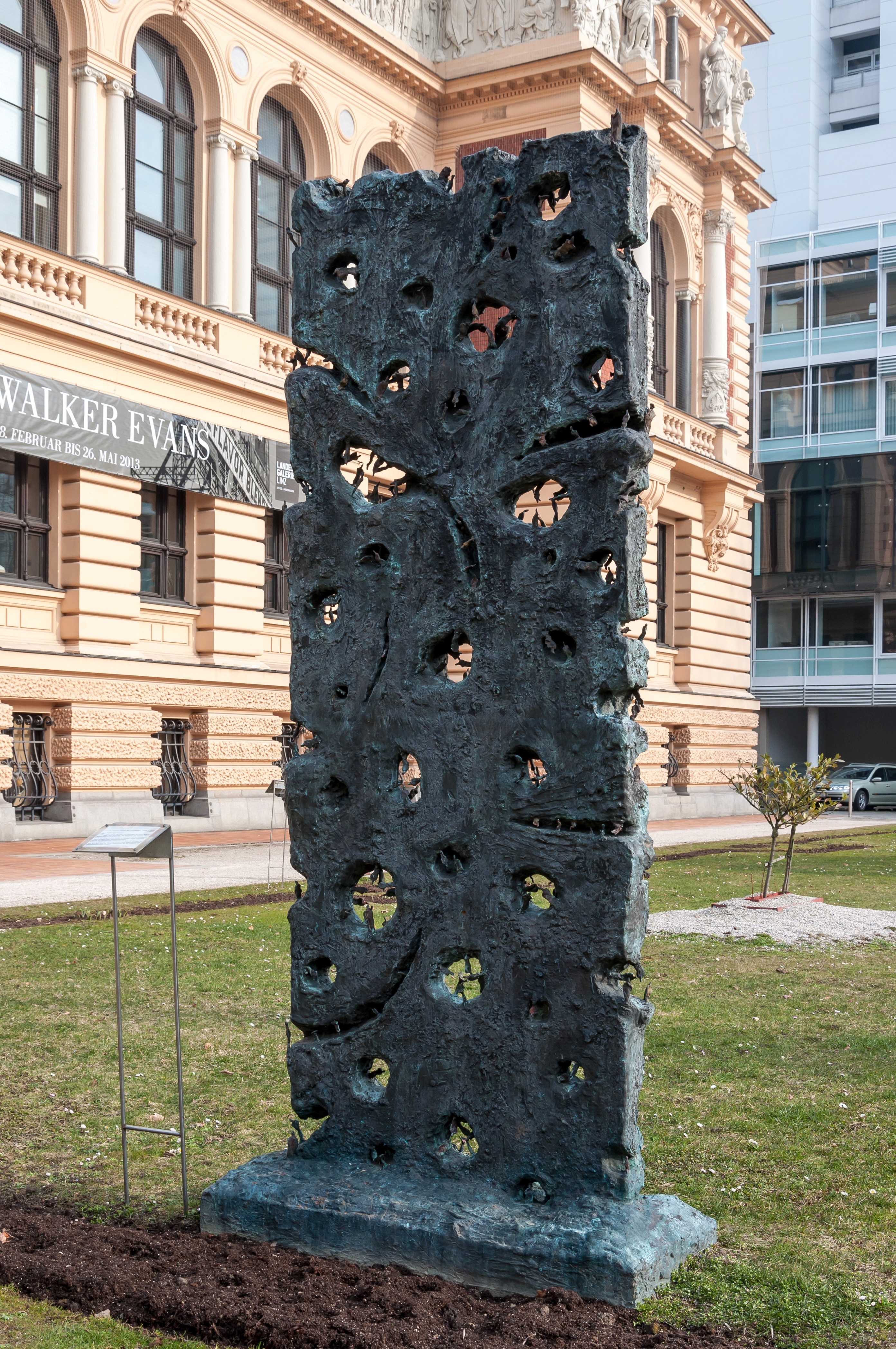 Museumspark: "Große Weltlochwand"